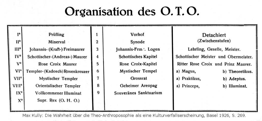 Aus dem Schaubild wird ersichtlich, wie die Organisation aufgebaut ist.